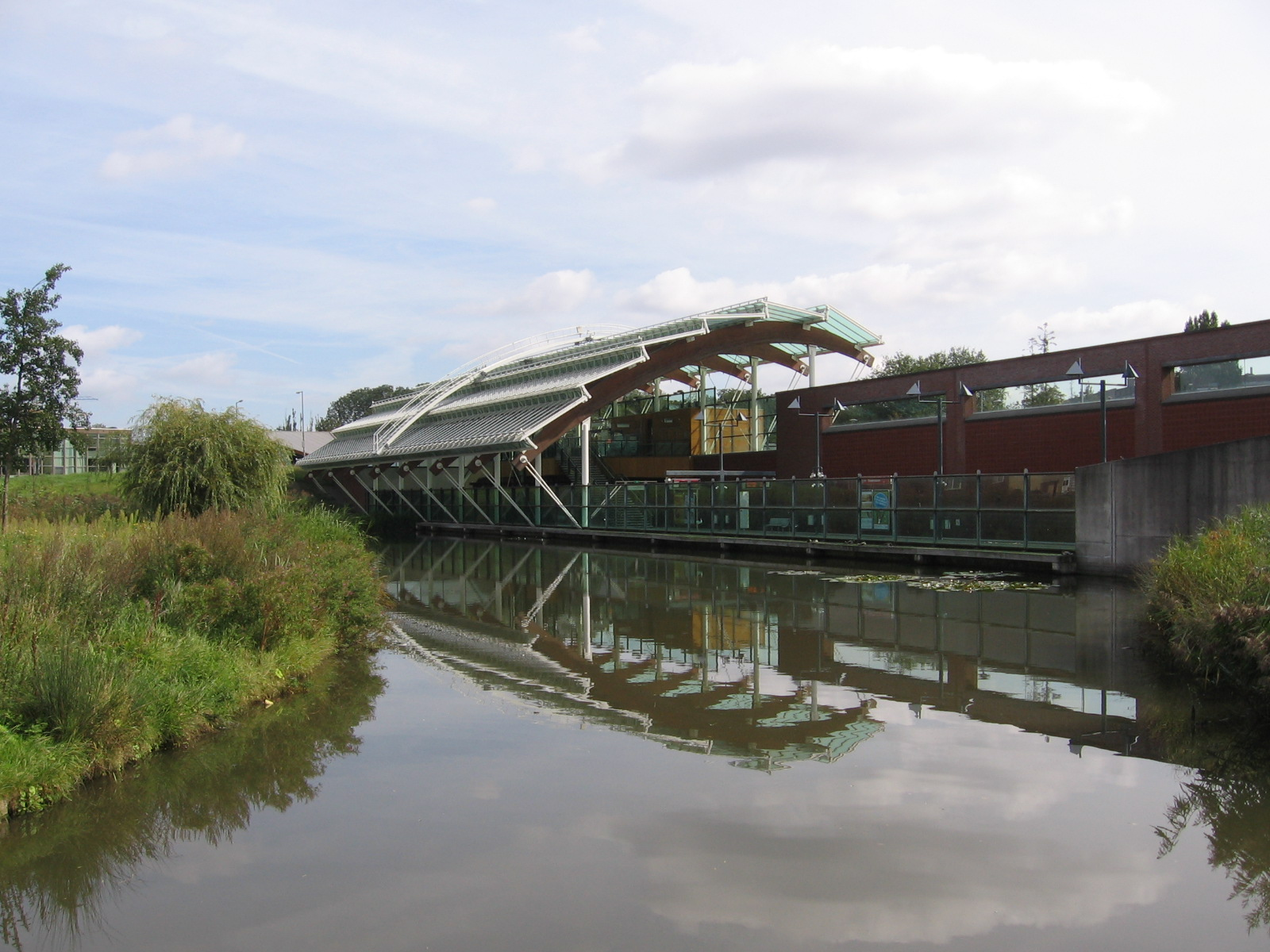 Station Troelstralaan in Schiedam